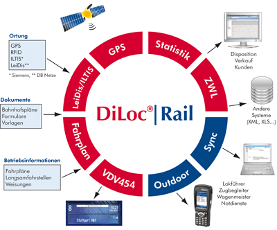 Modul-Grafik